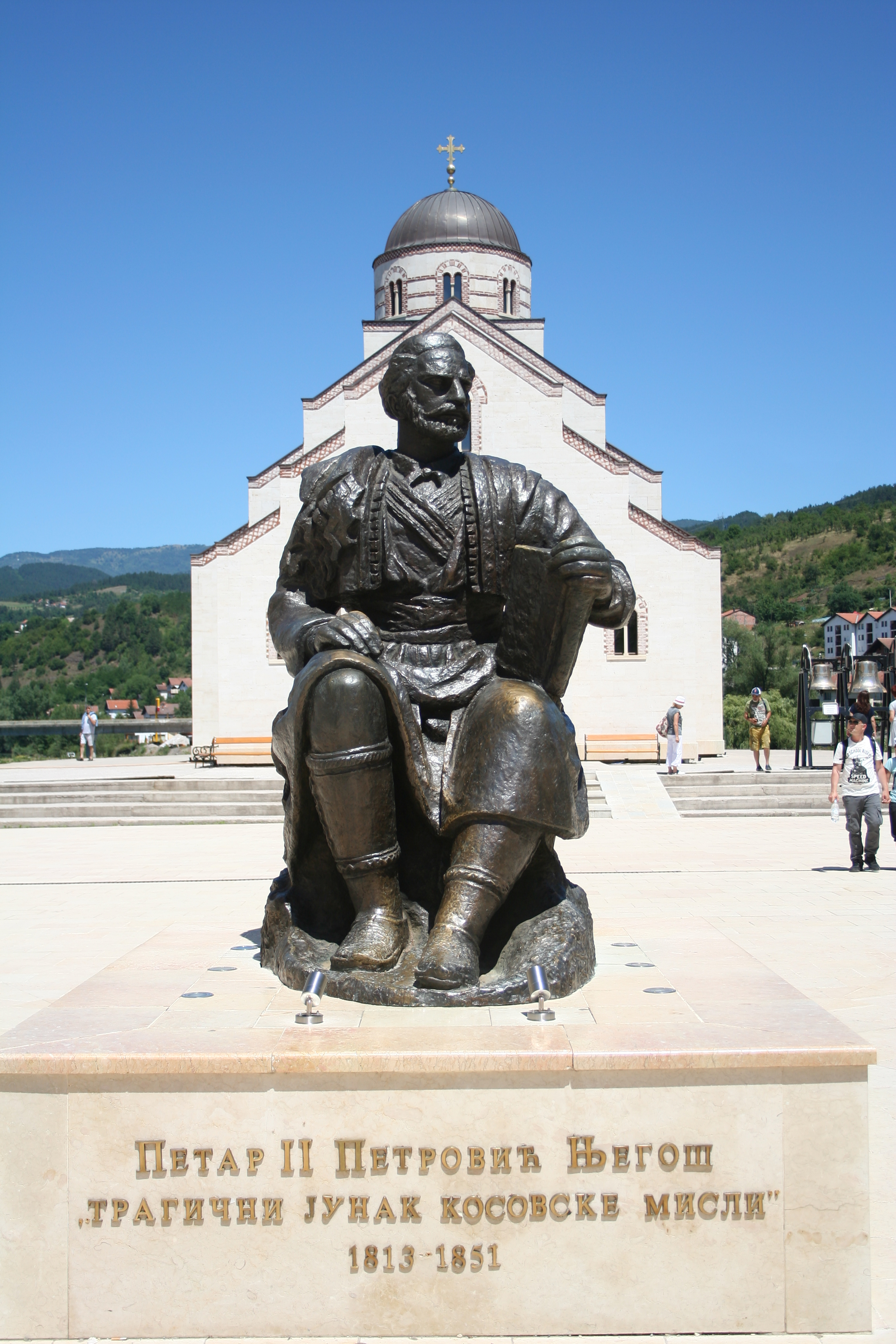 Andrić, Višegrad Republika Srpska